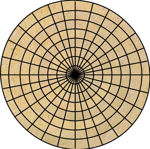 Deze cirkel is enkel een zelfgemaakte afbeelding en bevat geen onderdelen die afkomstig zijn van andere bronnen.